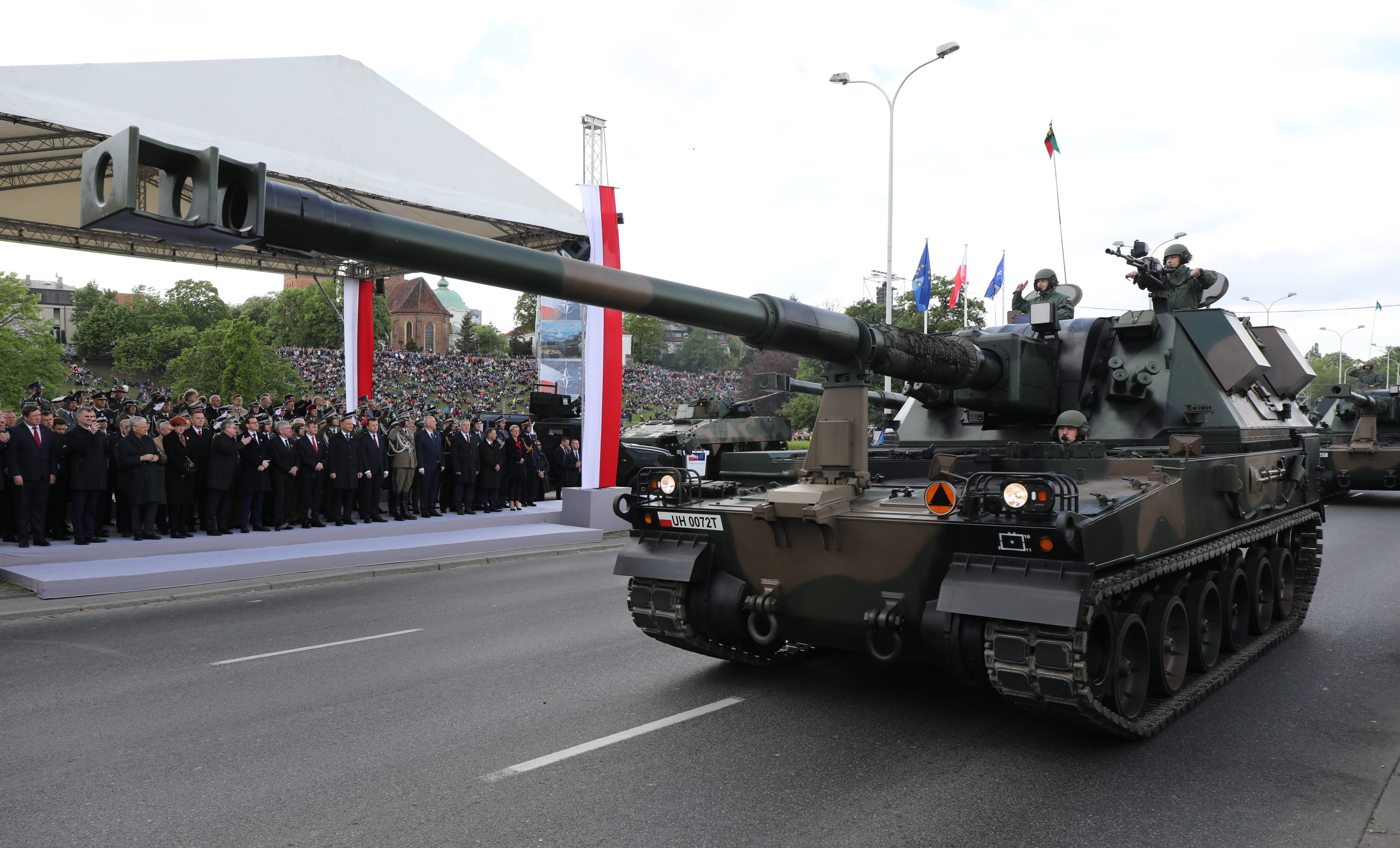 Wisłostrada w Warszawie, defilada „Silni w sojuszach”: AHS Krab.